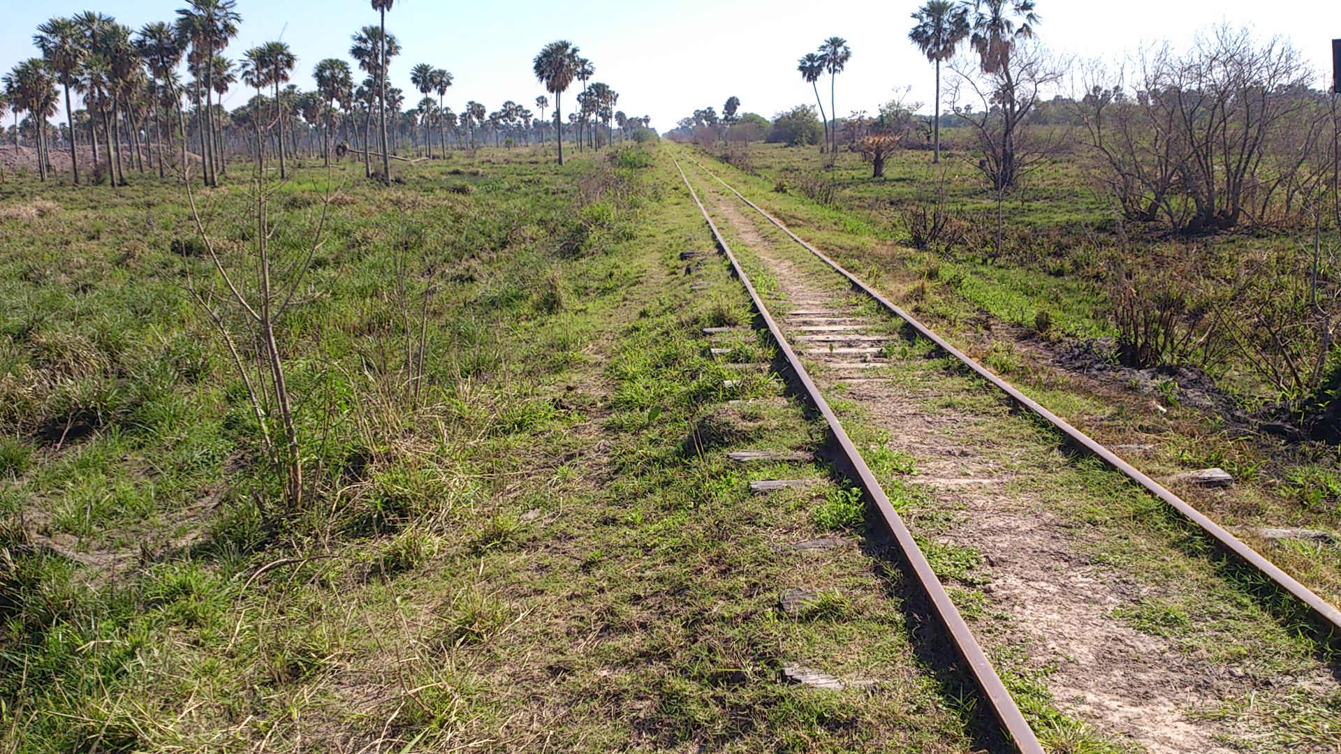 Vias del Belgrano